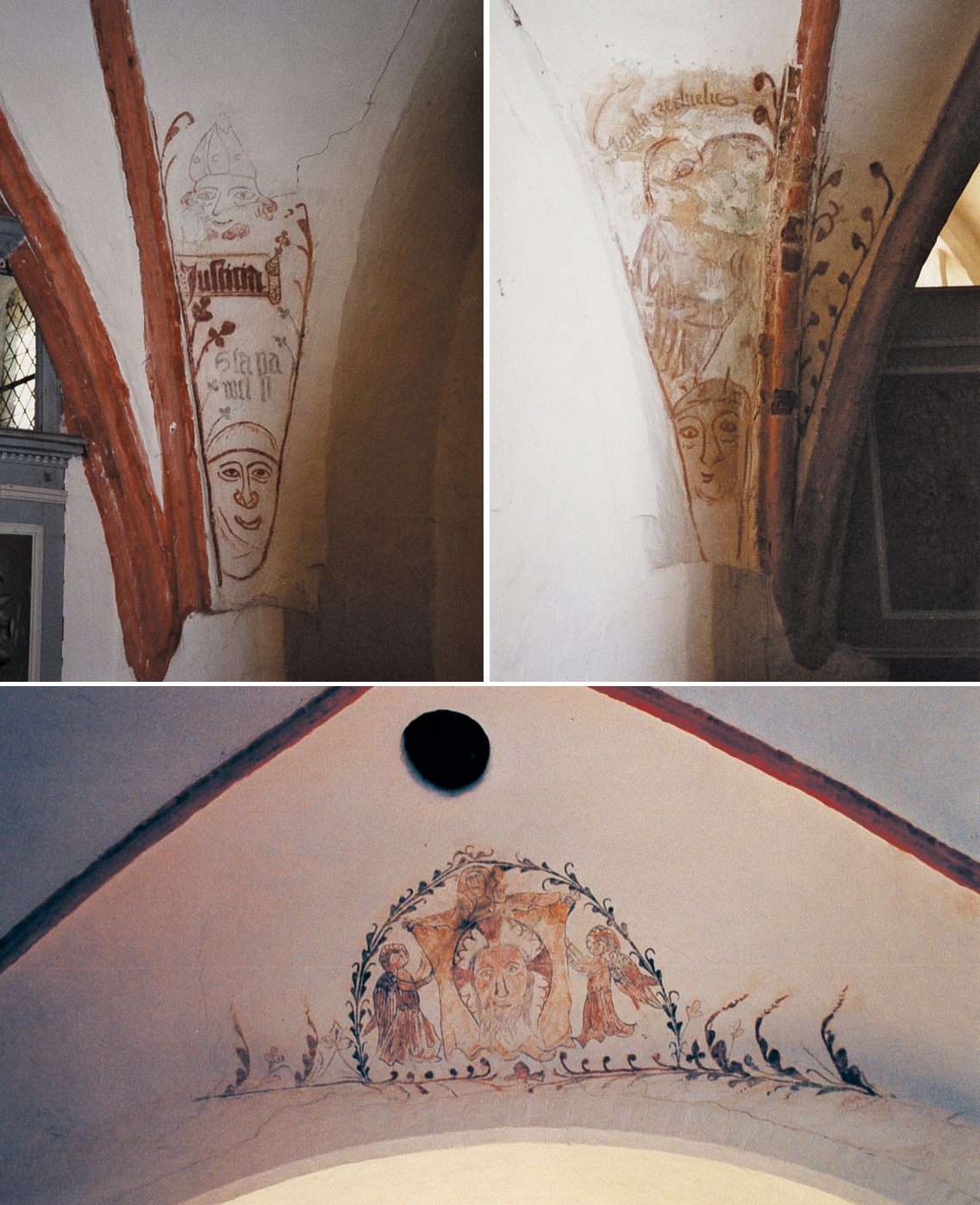 Gotische Malereien in der Dorfkirche von Lancken-Granitz (Mecklenburg-Vorpommern)